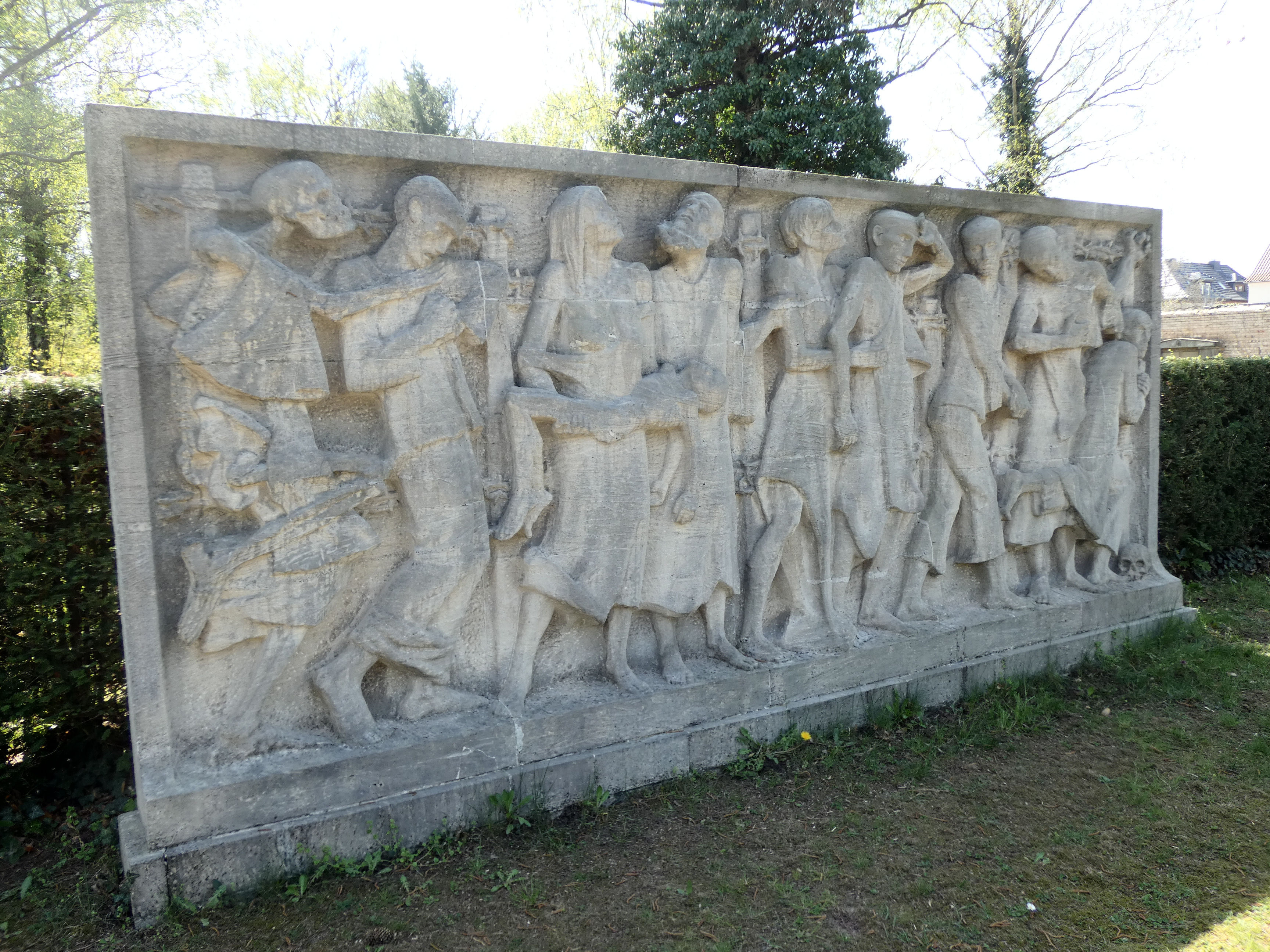 Kalksteinrelief Passion (1948) zum Gedenken an die Opfer des Faschismus von Herbert Volwahsen, Gertraudenfriedhof Halle (Saale)